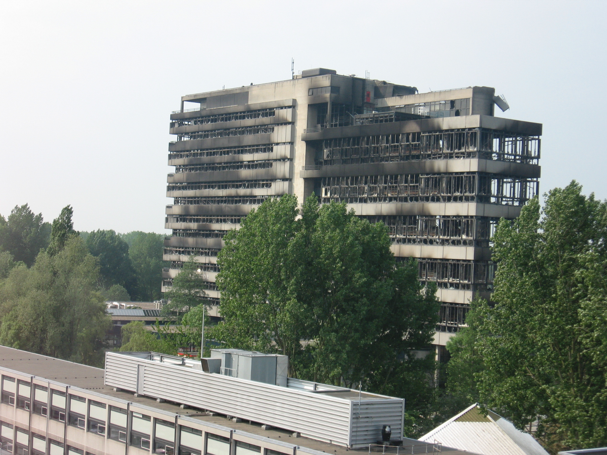 gebouw Bouwkunde, 1 dag na de brand